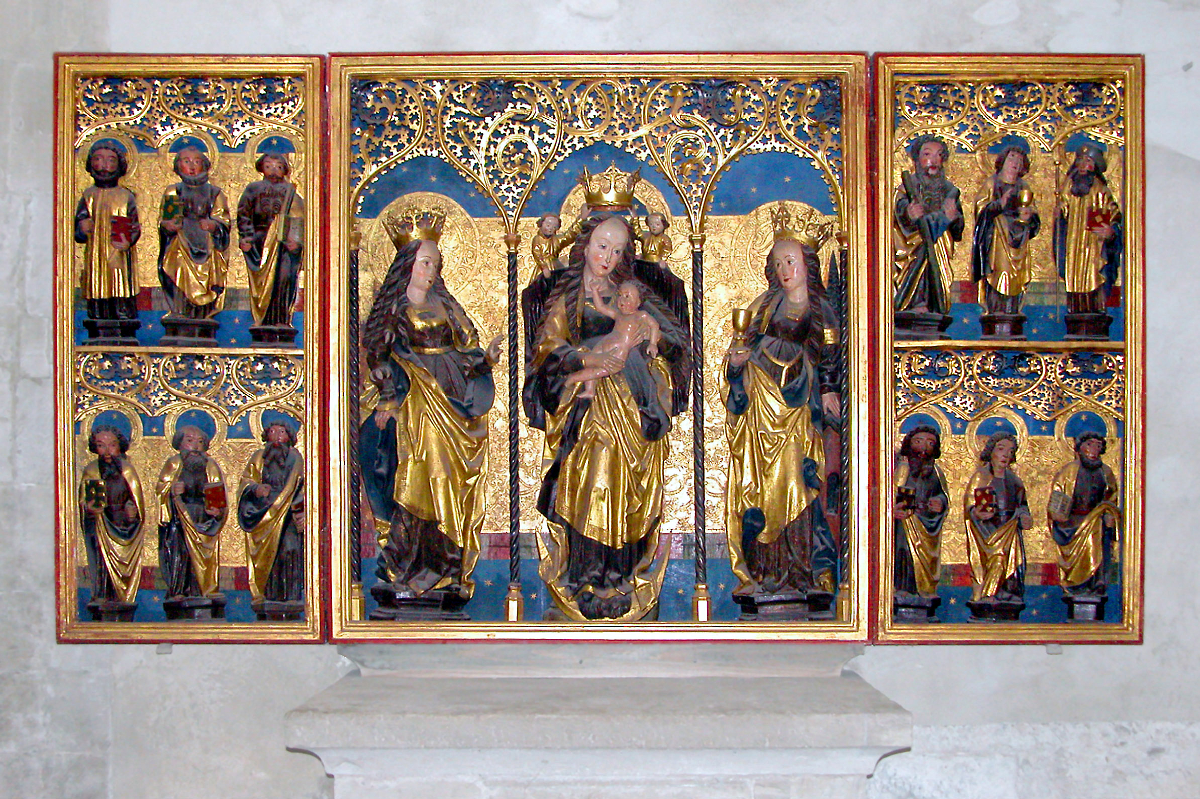 03.05.2004 06618 Naumburg: Dom, spätromanisch-frühgotisch. 1. Weihe 1042, oft verändert. Marienretabel im Südquerhaus aus der Zeit um 1500. [DSCN3234.JPG]20040503470DR.JPG(c)Blobelt